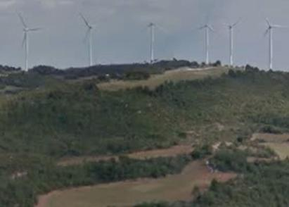 Imatge d'El Pujol, una muntanya de 812 metres situada a l'oest de la Serra de Rubió. El cim està rodejat per un camp de secà.